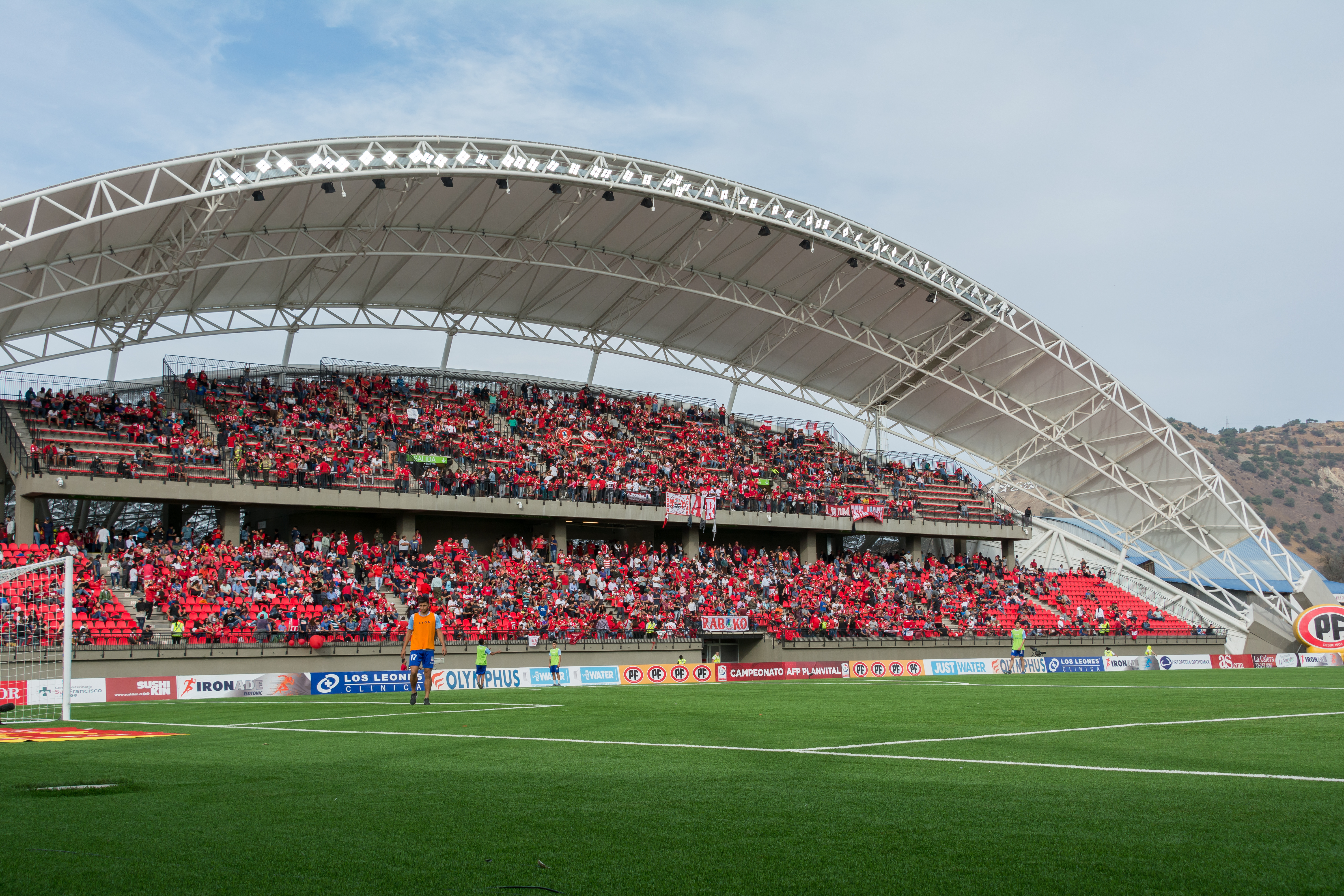 Unión La Calera v Colo-Colo, Estadio Municipal Nicolás Chahúan Nazar, La Calera, Región de Valparaíso, Chile.